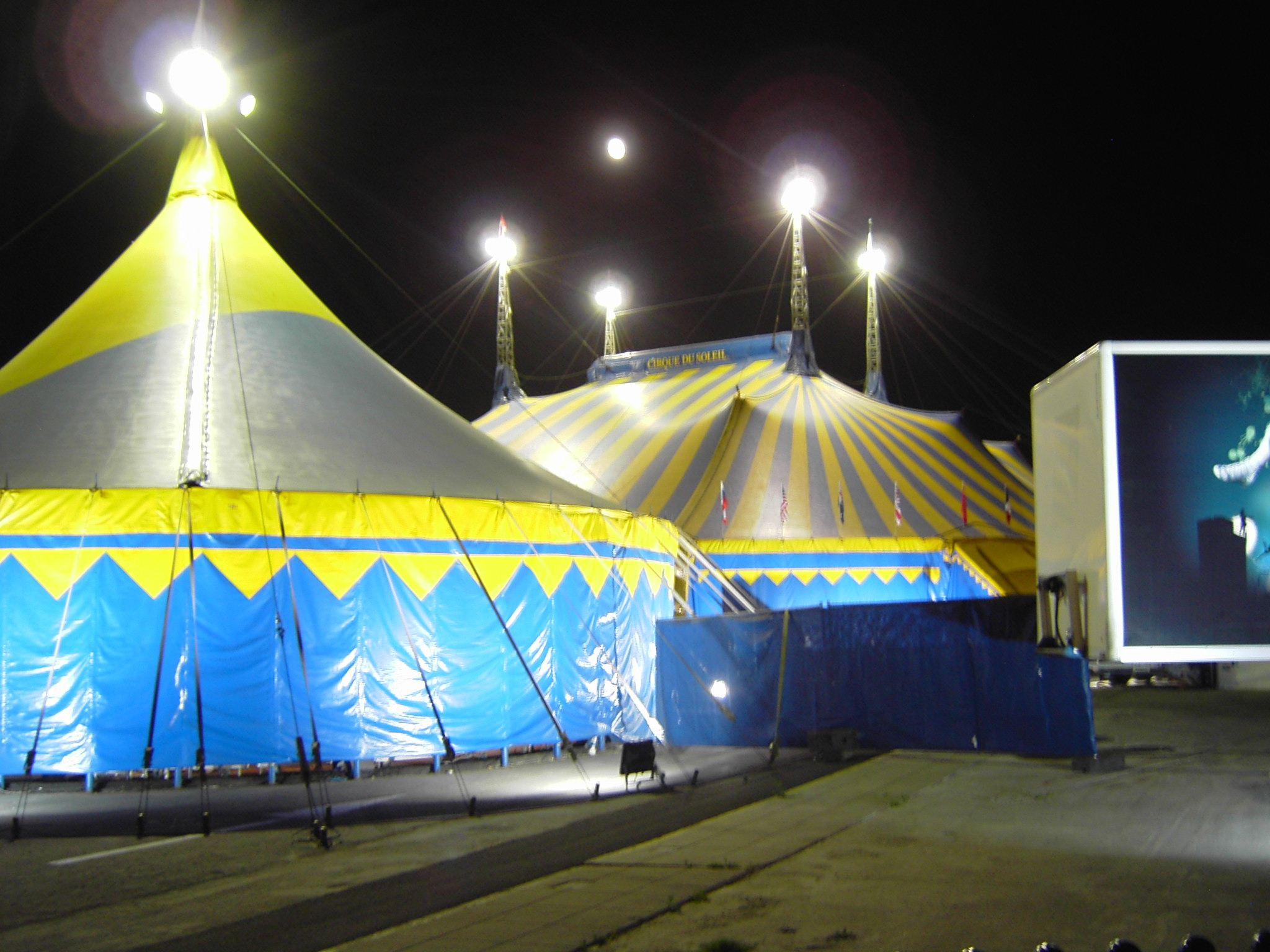 Carpa del Circo del Sol durante el espectáculo "Quidam" en Málaga en Junio de 2009